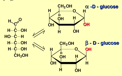 Posibles configuraciones de la alfa y beta glucosa